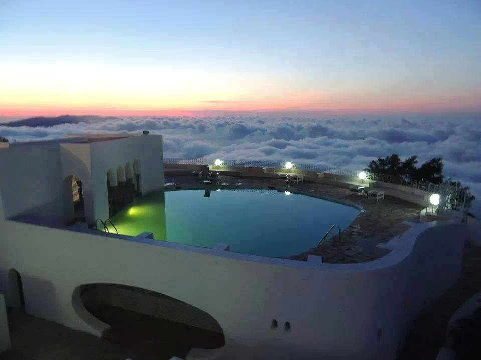 seraidii annaba bona algeria